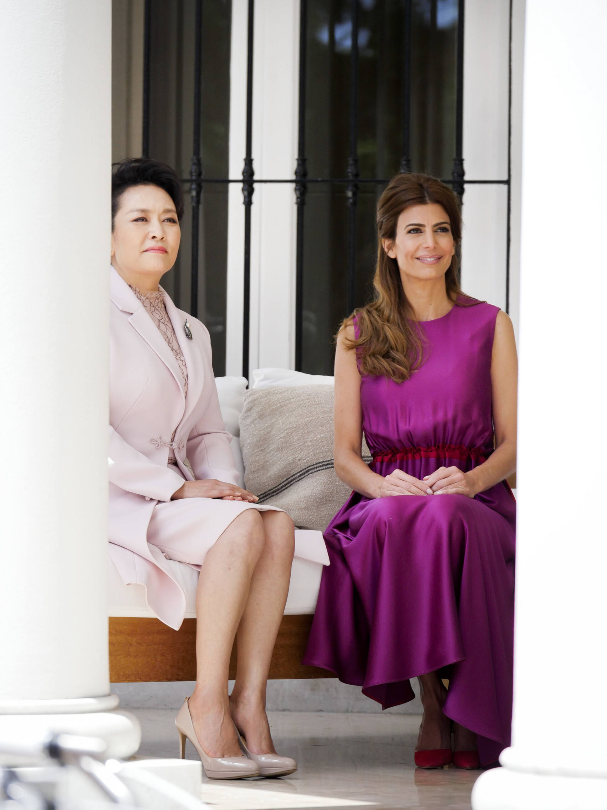 La primera dama, Juliana Awada, recibió en la Quinta de Olivos a la primera dama China, PengLiyuan.